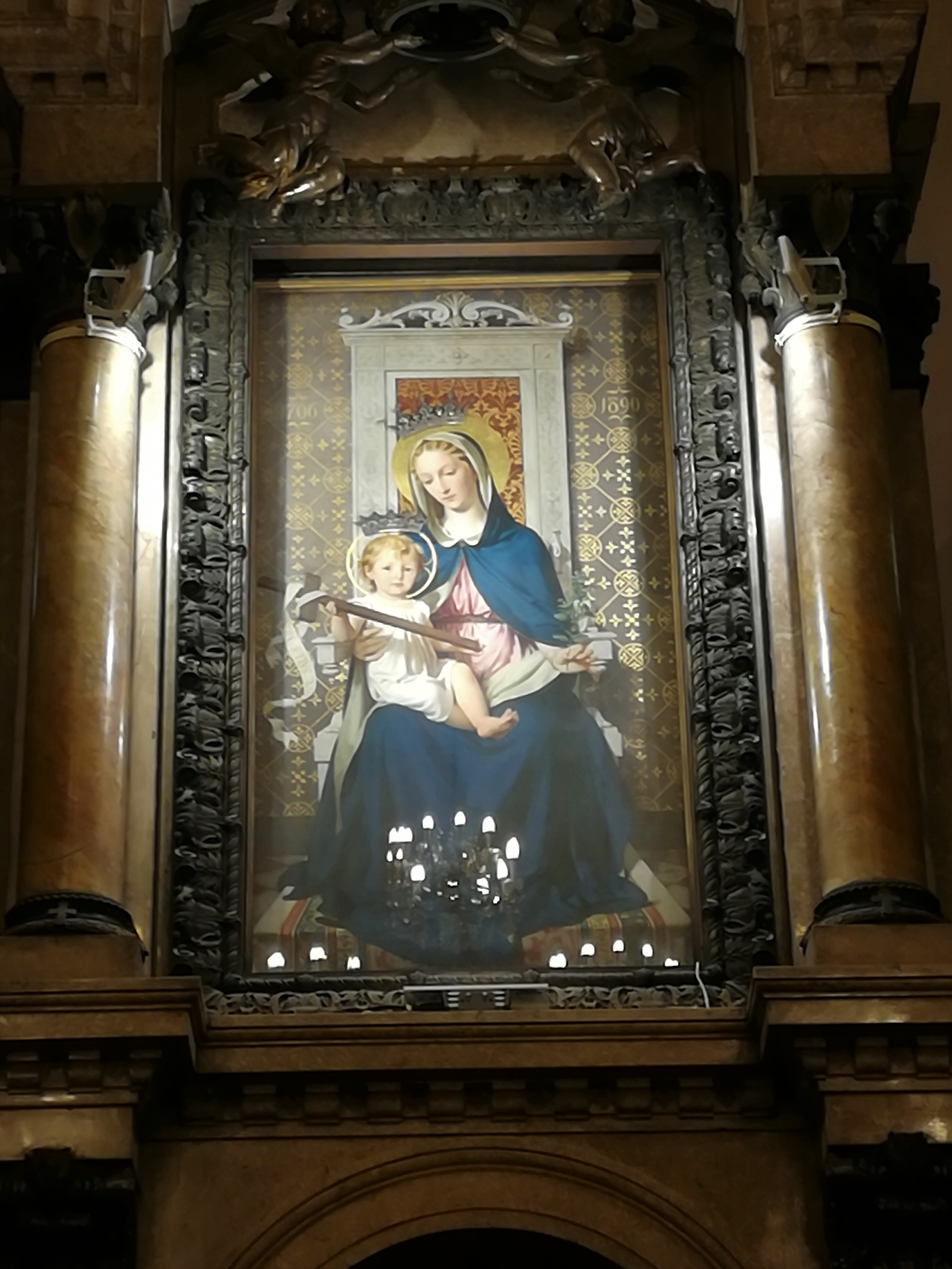 Immagine della Madonna della Salute ad opera di Enrico Reffo collocata all'interno della Chiesa della Salute in Torino.